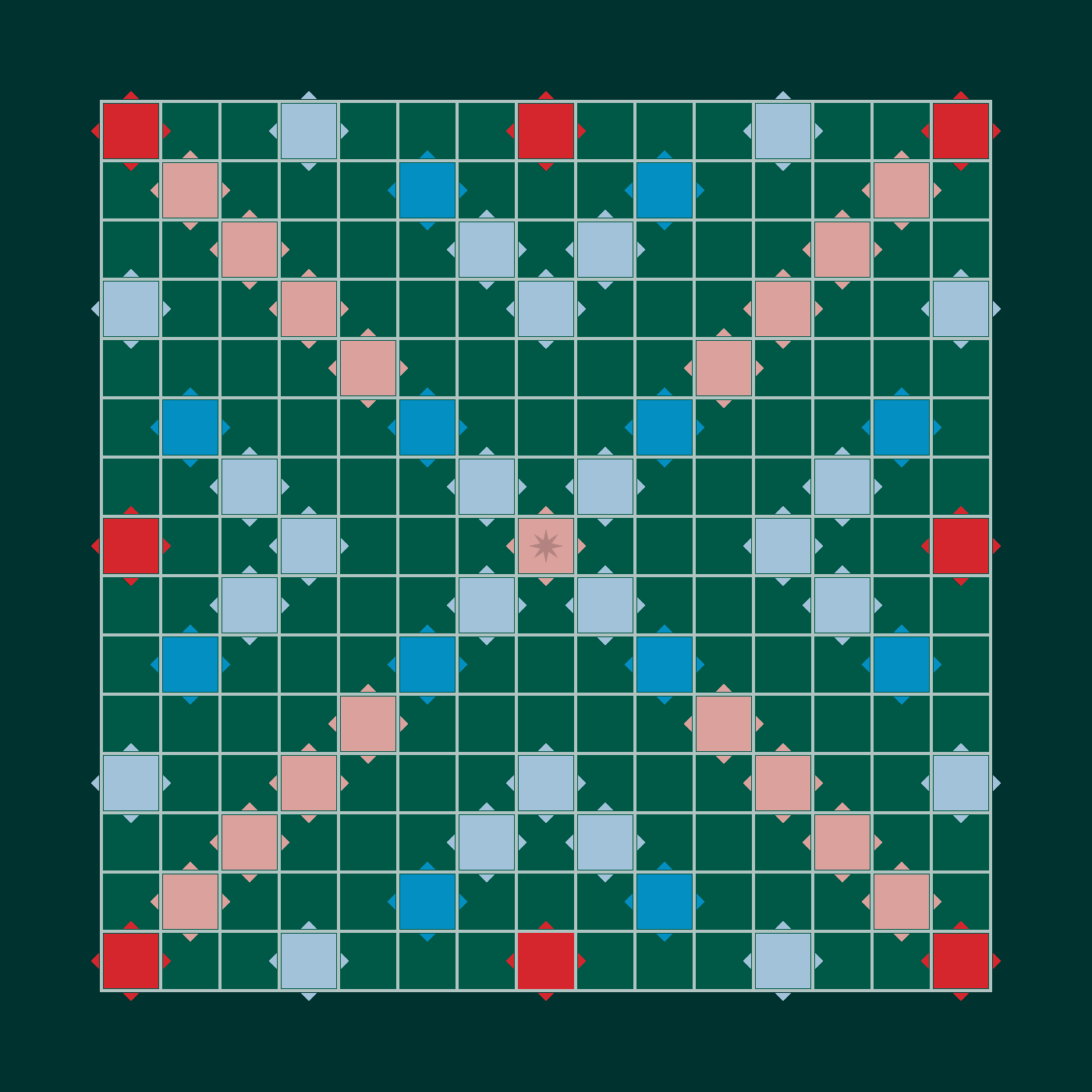 Hrací plán pre Scrabble